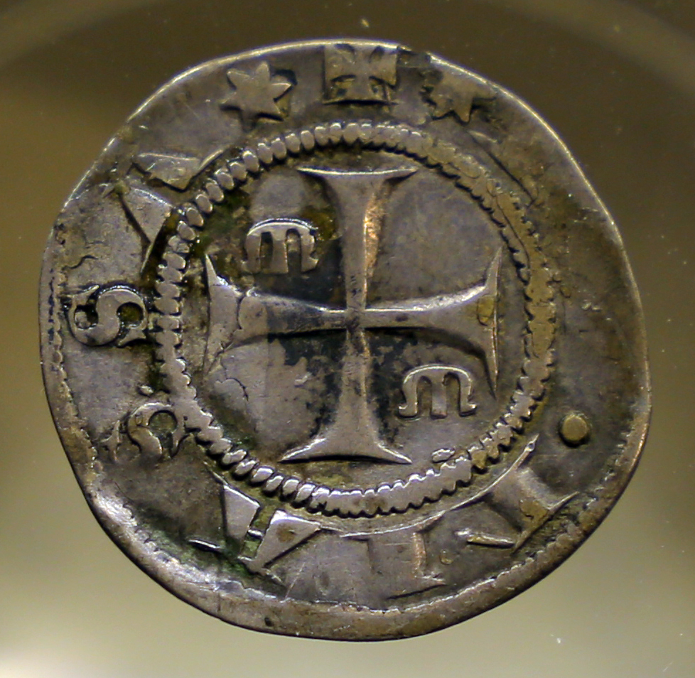 Museo di Arte Sacra (Massa Marittima) This is a photo of a monument which is part of cultural heritage of Italy.